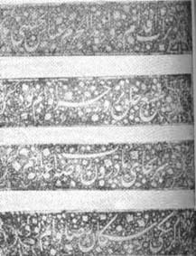 نمونه خط نستعلیق علی‌رضا عباسی بر روی ضریح اسبق امام رضا، چاپ شده در مجله هنر ومردم ، شمار۰ ۱۸۹-۱۹۰ (تير و مرداد ۱۳۵۷)